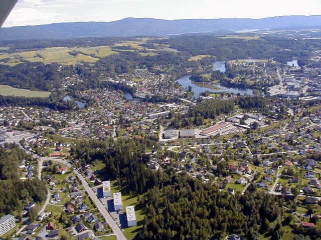 Randselva og Nordsiden i Hønefoss (Northern Hønefoss)